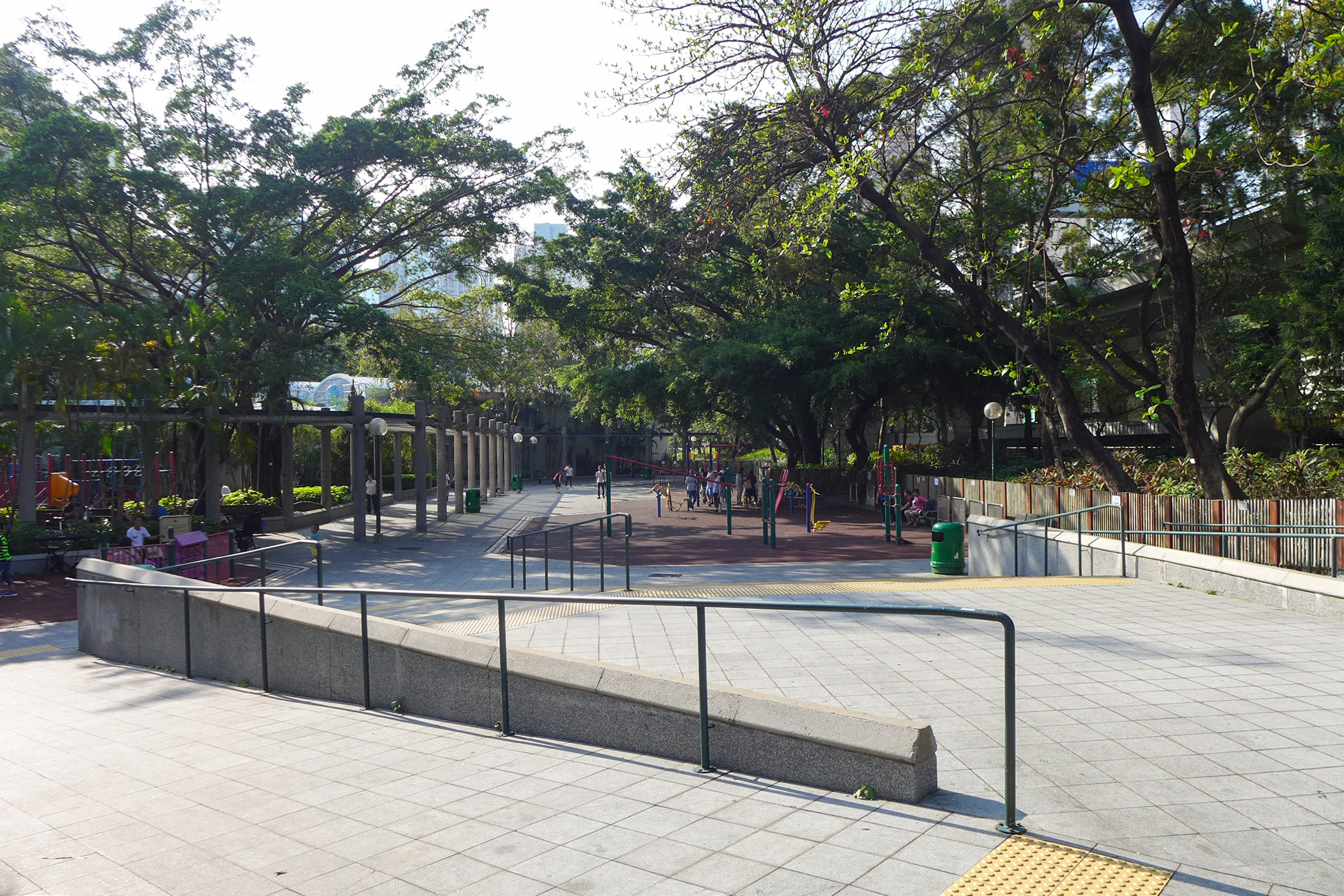 Tung Chau Street Park